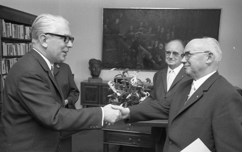 Bundestagspräs. von Hassel überreicht Vizepräs. Schoettle das Bundesverdienstkreuz